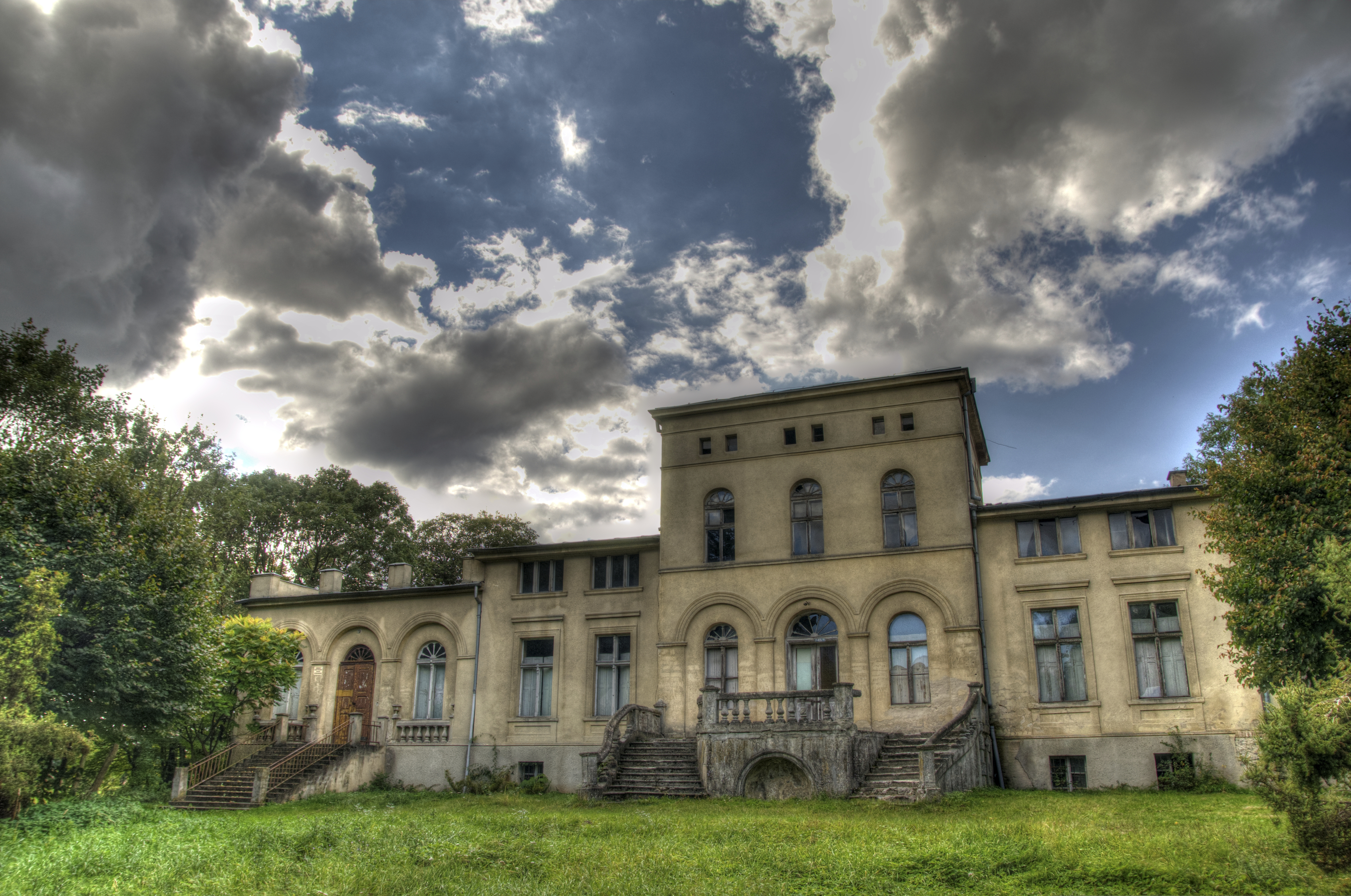 pałac z 1840 r., XIX/XX w. Pakosław, Lwówek